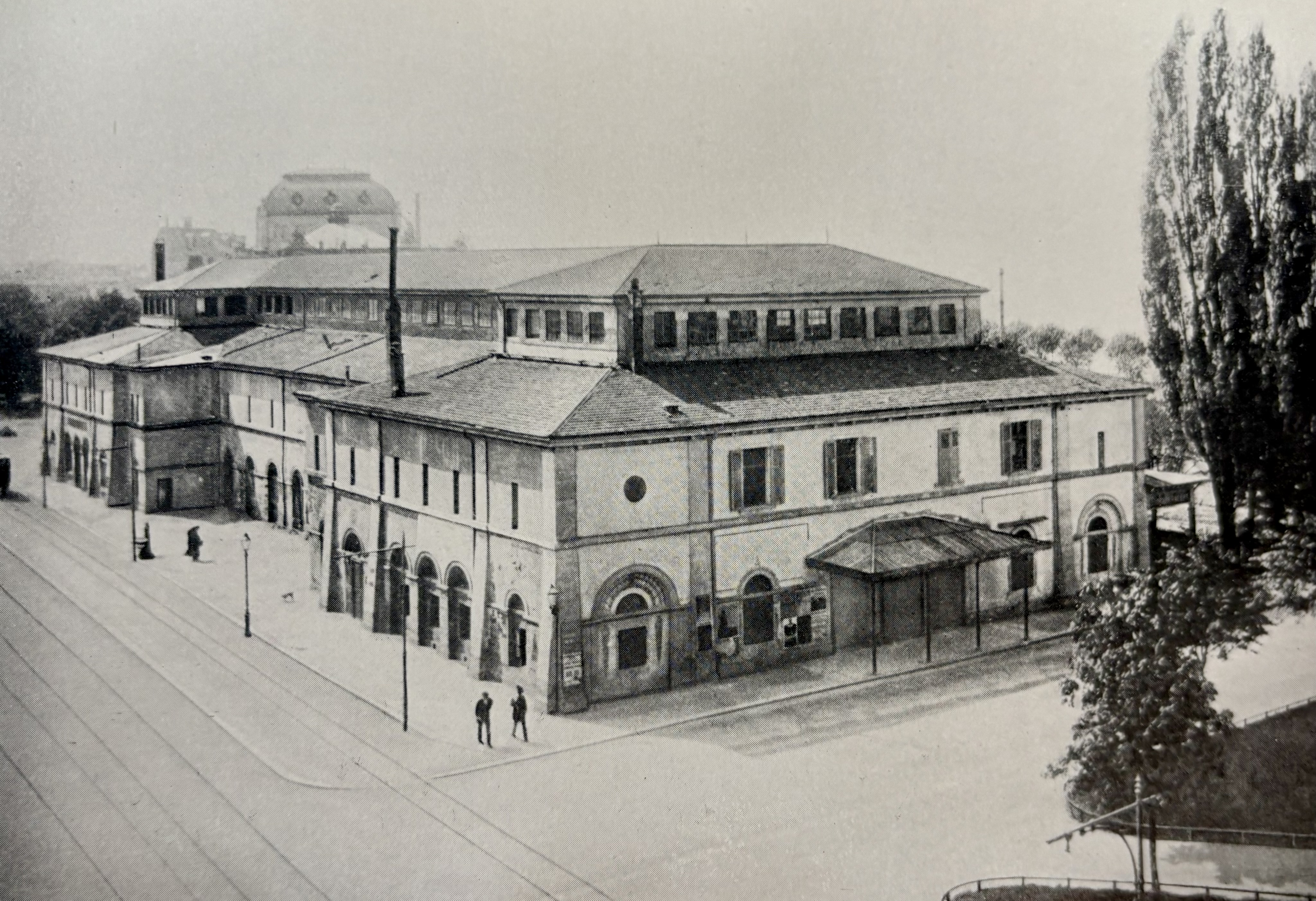 Die alte Tonhalle 1895 auf dem heutigen Sechseläutenplatz. 1837 - 39 als Kornhaus erbaut, 1867 zur Tonhalle umgestaltet für Konzerte, Anlässe, Vorträge. 1896 abgetragen, Areal seither freigehalten.